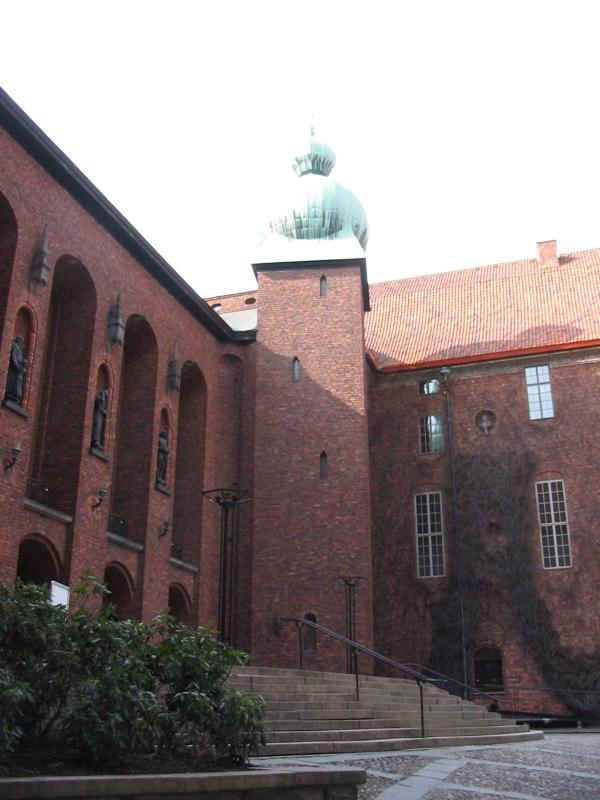 Innergården i Stockholms stadshus. Eget foto.